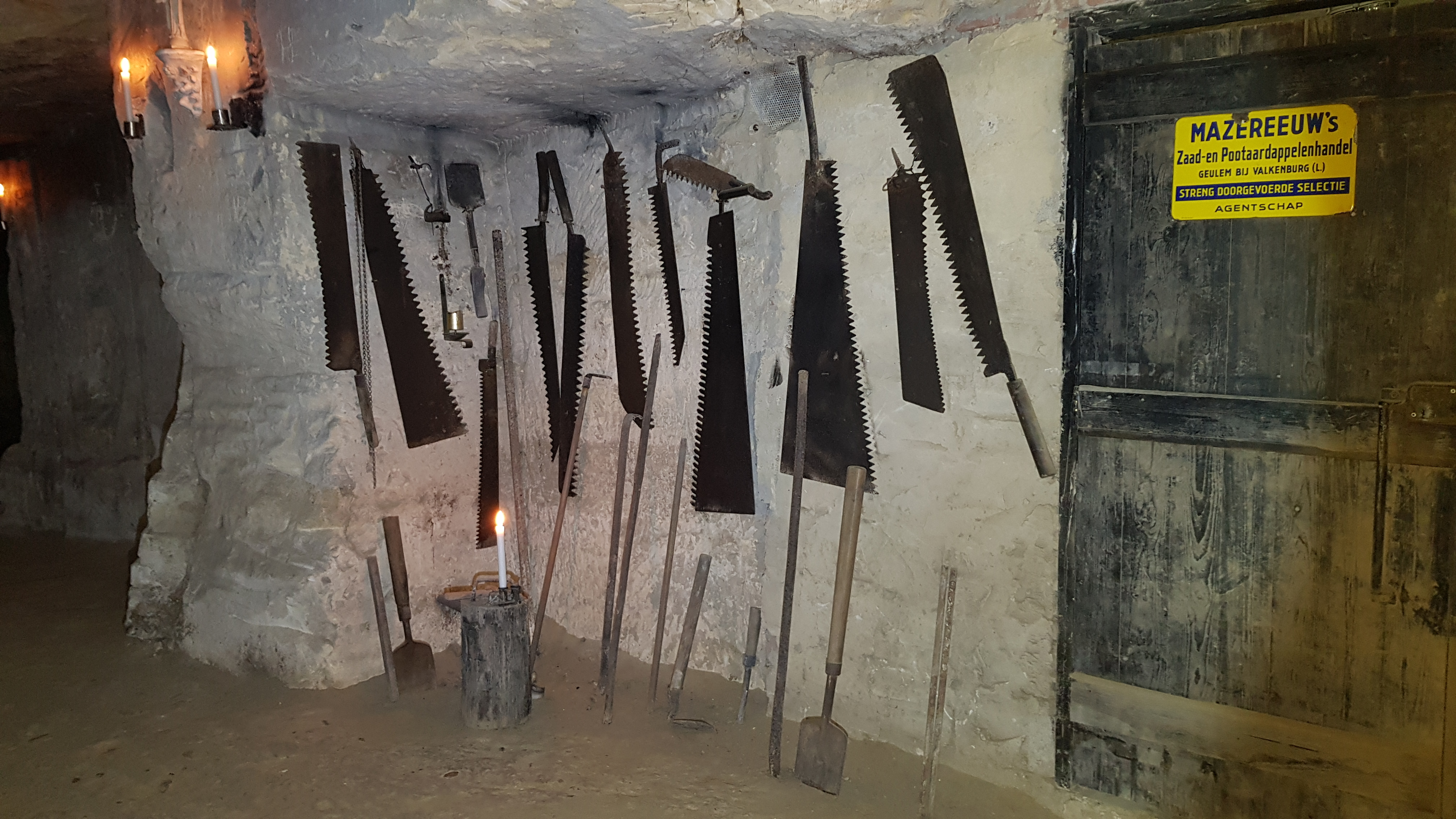 zagen in de Geulhemmergroeve, Geulhem, Nederland